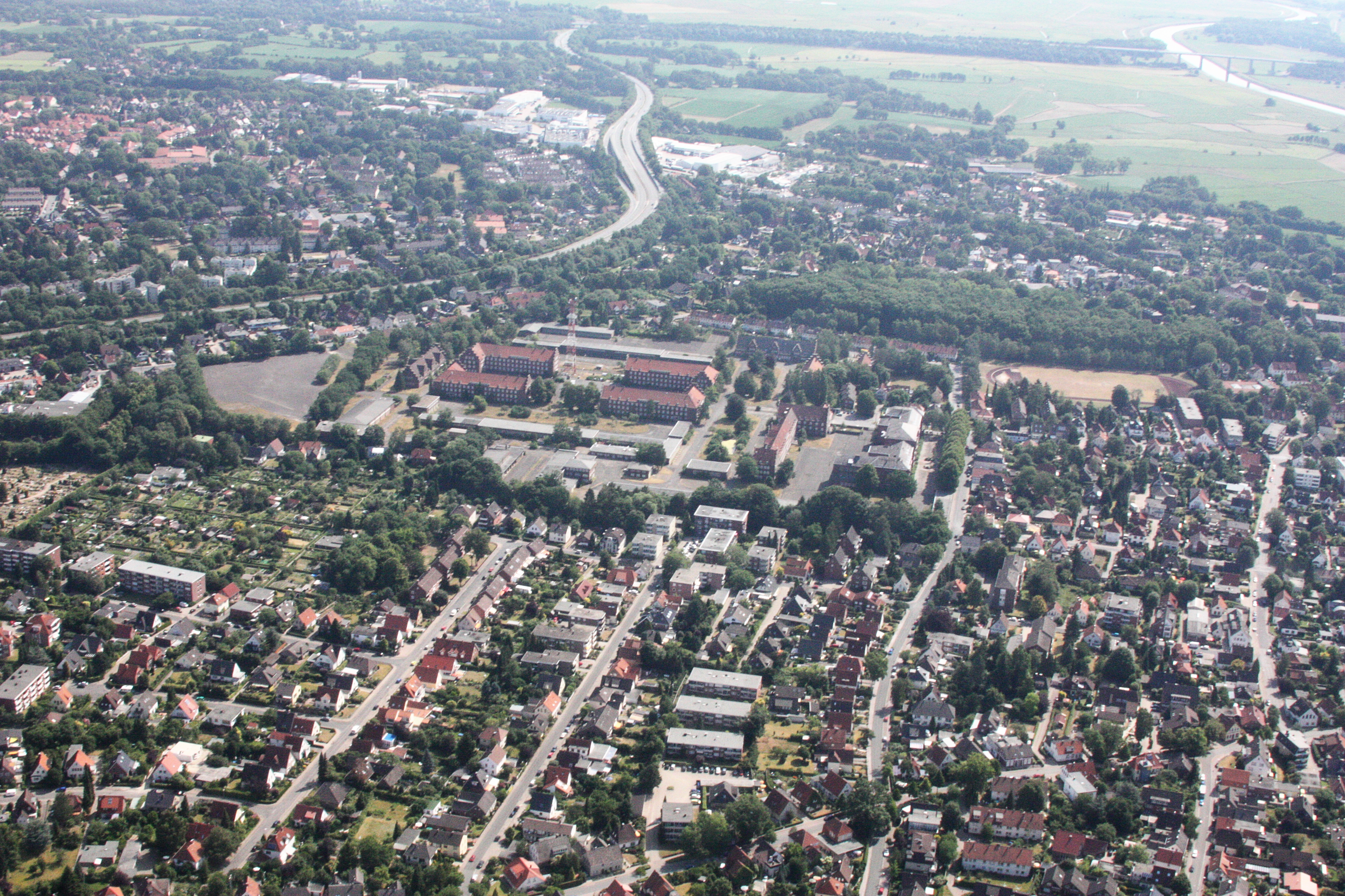 Luftaufnahmen Oldenburg (Oldenburg), mit Weiterflug nach Westen; 1500 Fuß Flughöhe; Juli 2010; Originalfoto bearbeitet: Tonwertkorrektur und Bild geschärft mit Hochpassfilter